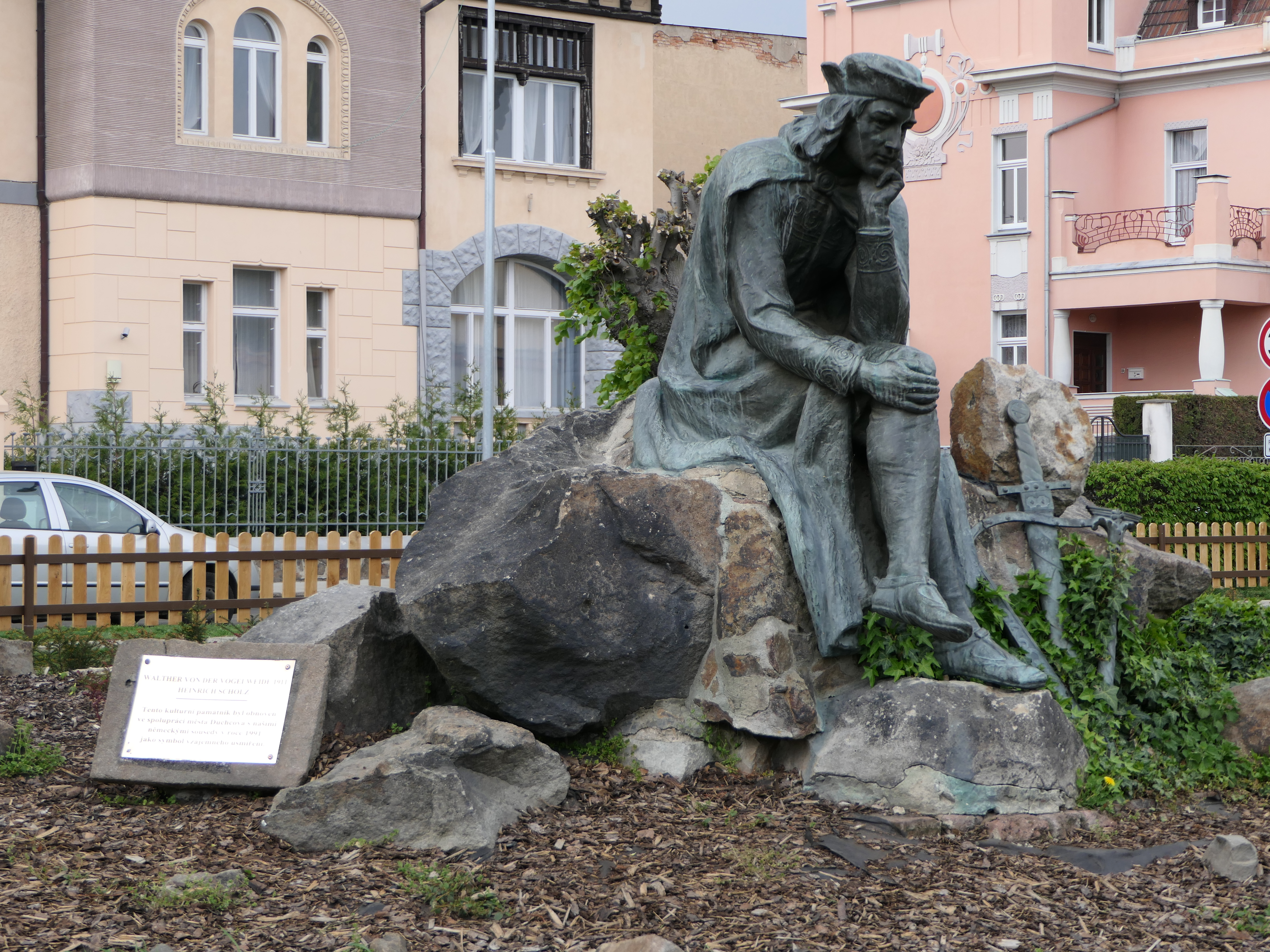 Denkmal für Walther von der Vogelweide in Duchcov, geschaffen von Heinrich Karl Scholz, 1911